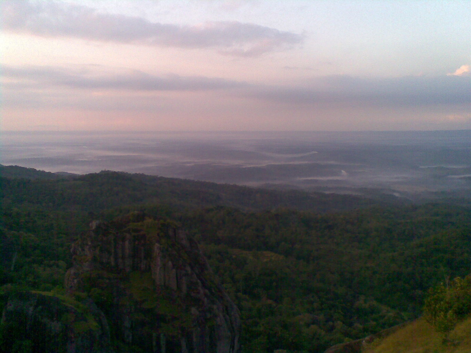 Keindahan alam dari puncak Ngalnggeran